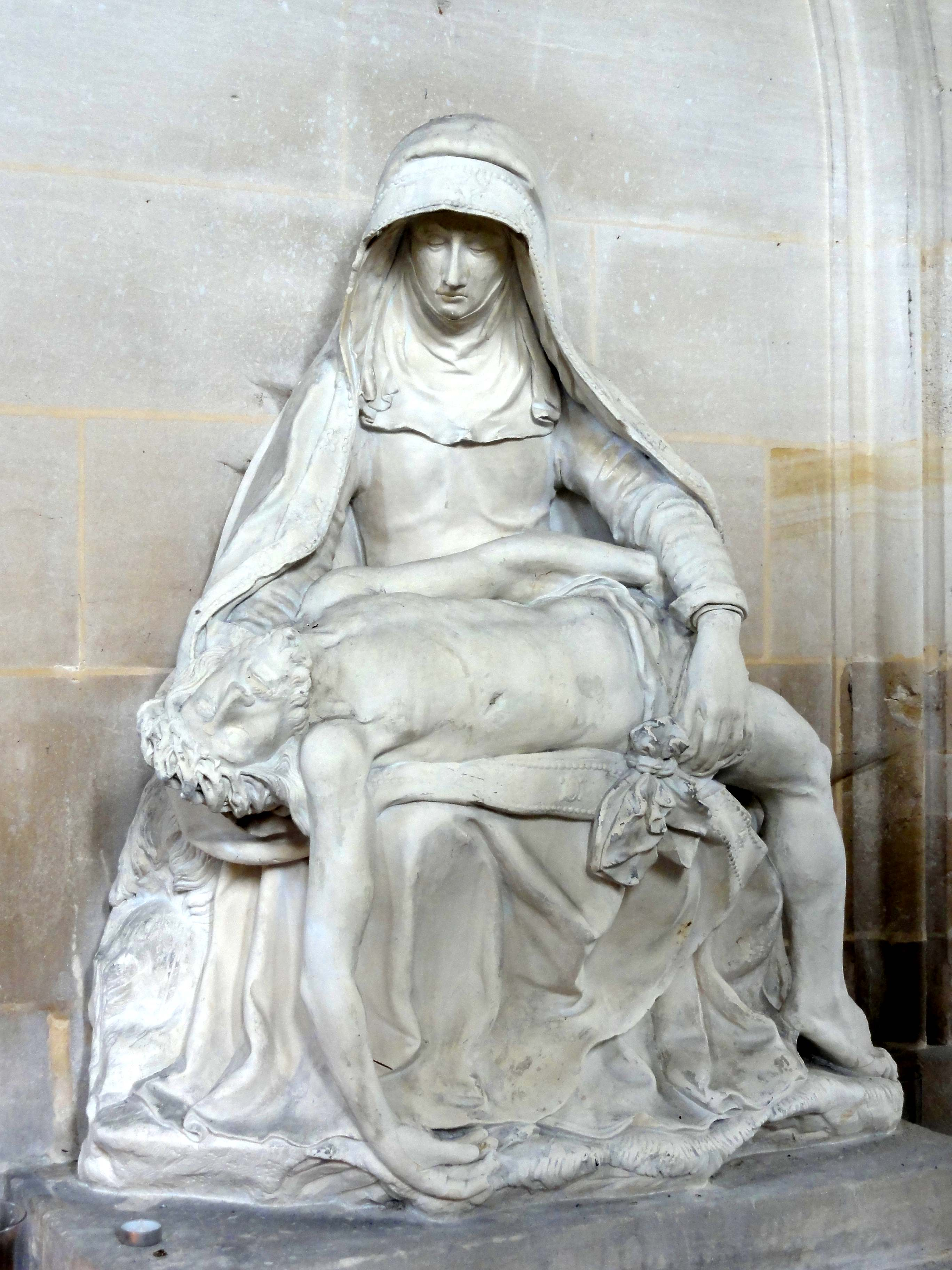 Mobilier de l'église (voir titre).